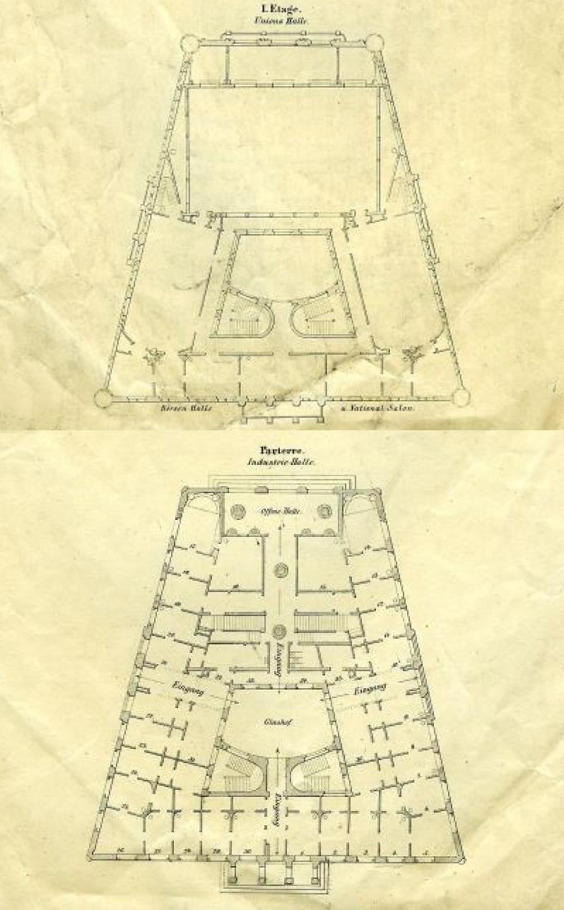 Plan für Erdgeschoss und 1. Etage der Centralhalle Leipzig